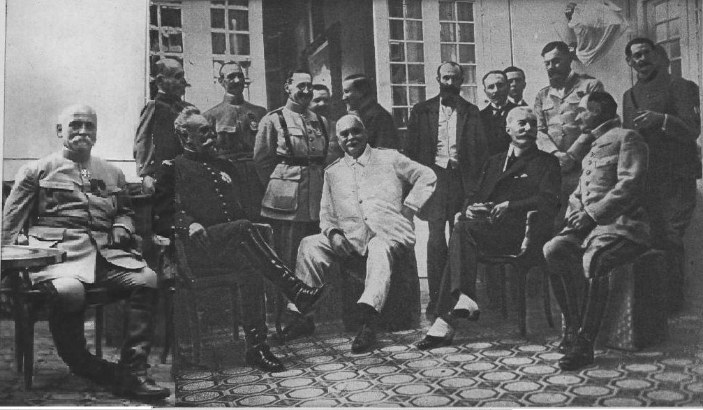 Un repas_à_Athènes_avec Reygnault, Sarrail, Braquet, Jonnart_Gueydon et après pose pour la presse, édité dans Le Miroir N°192.